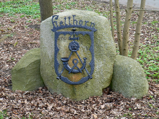 Wappenstein von Hetthorn Foto: Helmut Schwarting